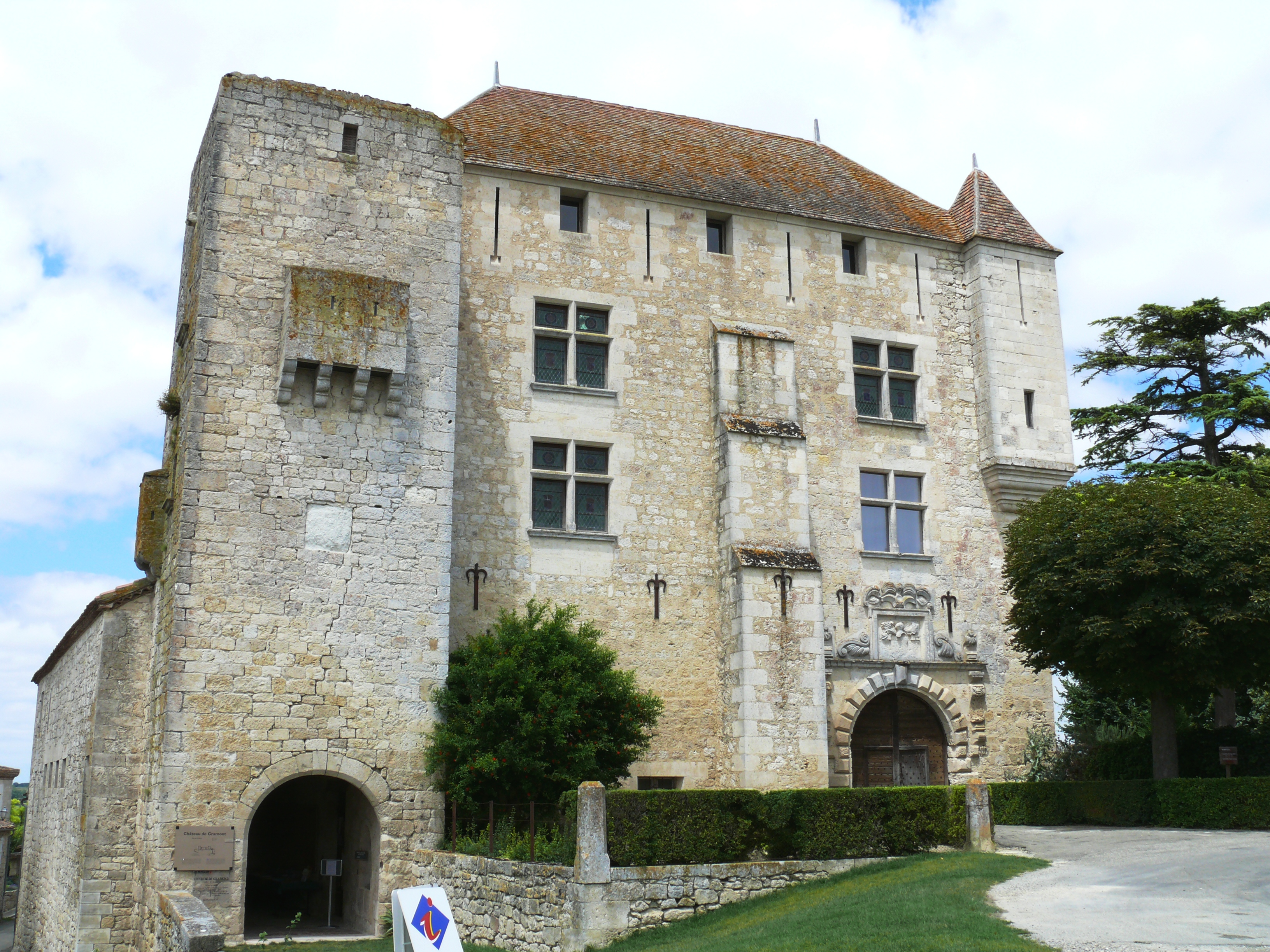 Château de Gramont (Tarn-et-Garonne) - Façade de l'entrée